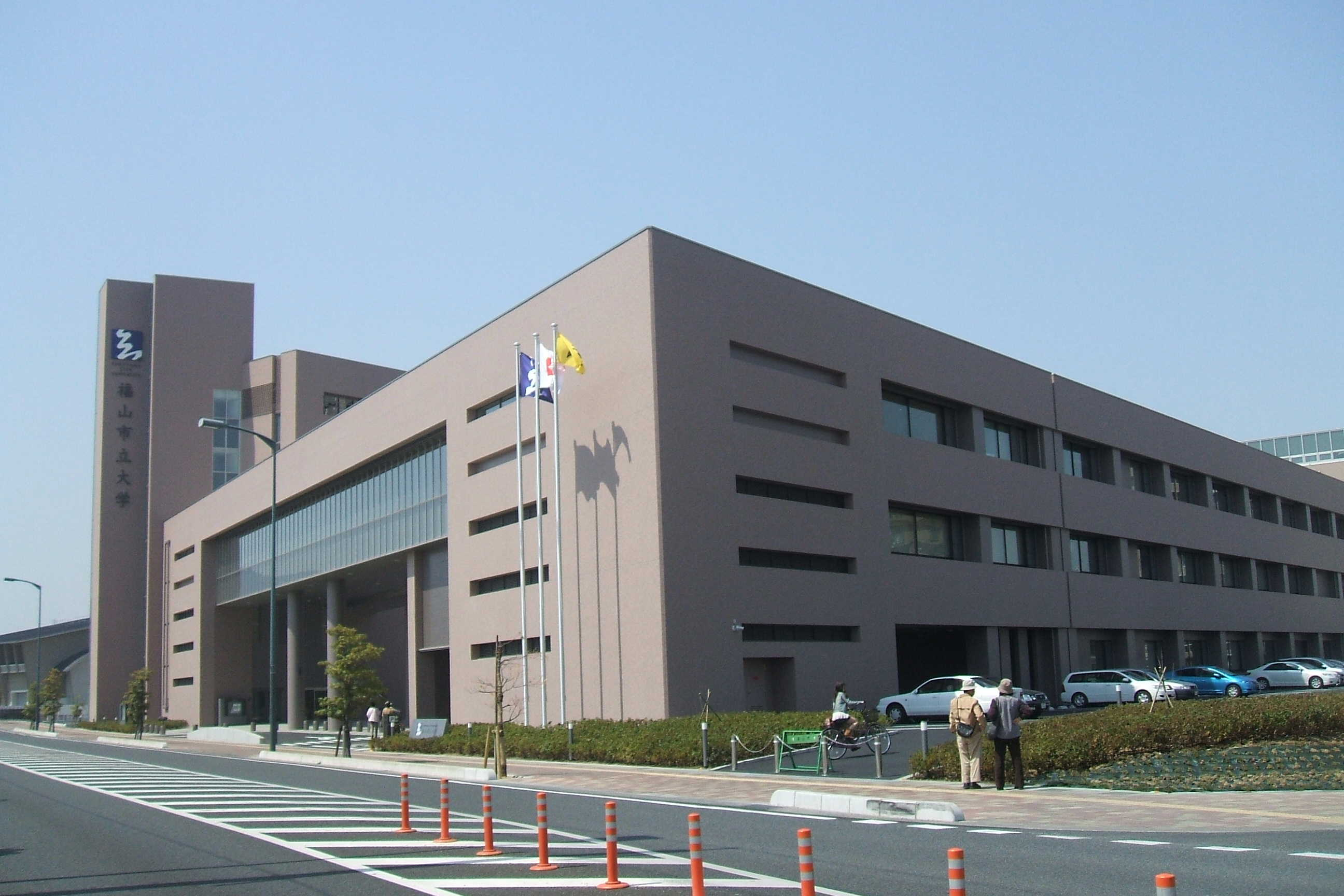 広島県福山市にある福山市立大学の校舎を東側市道より撮影